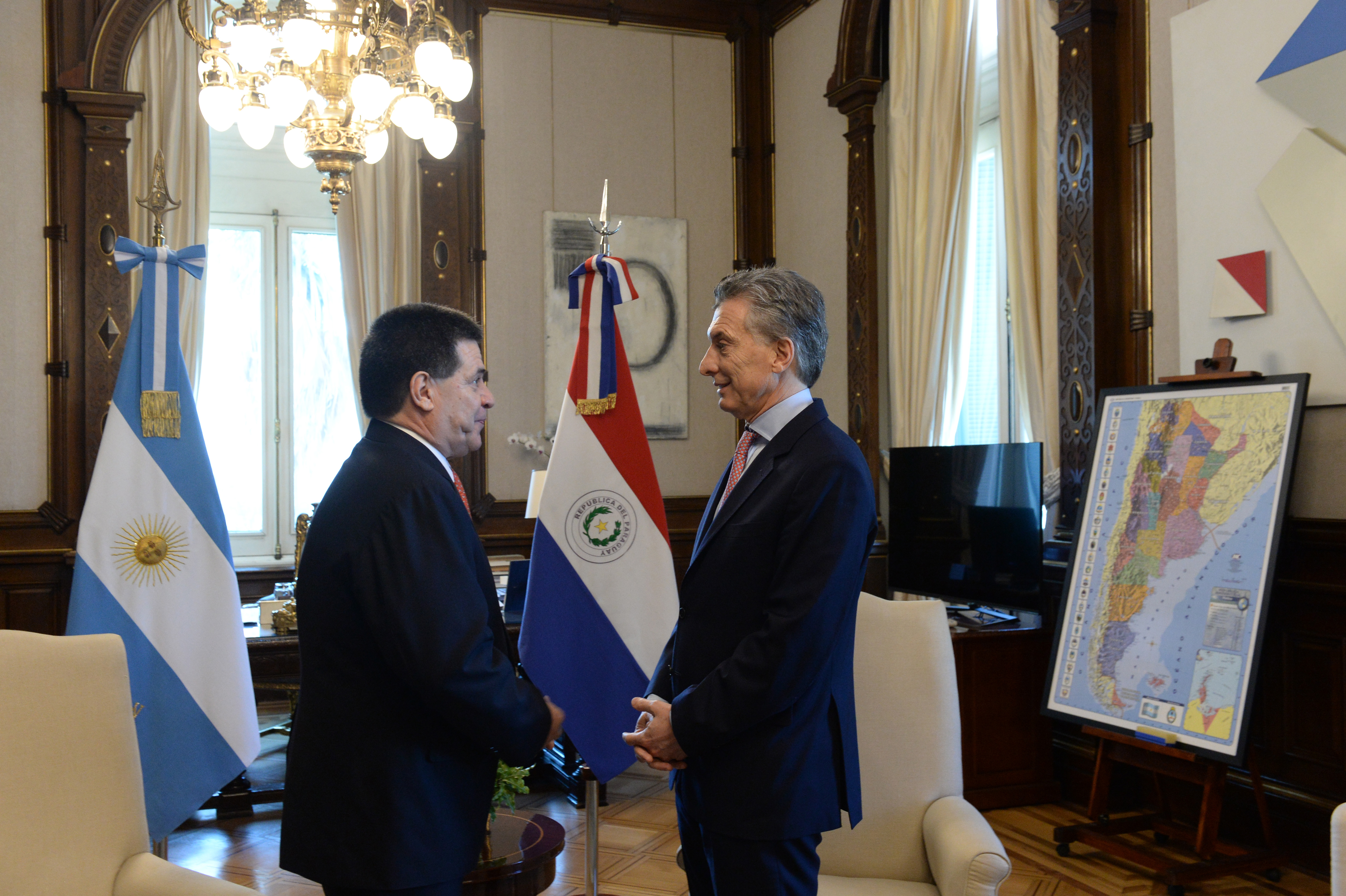 El Presidente argentino Mauricio Macri junto a su par paraguayo Horacio Cartes en la Casa Rosada